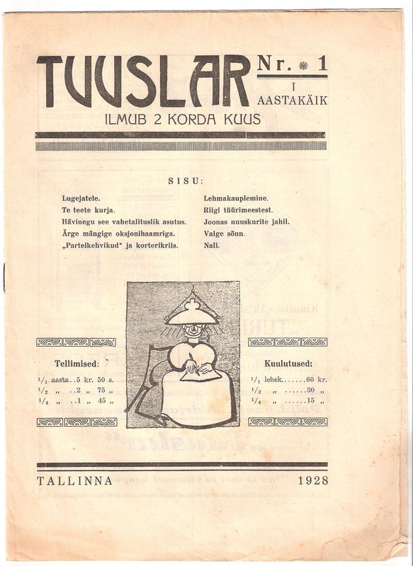 Tuuslar 1928 esikaas